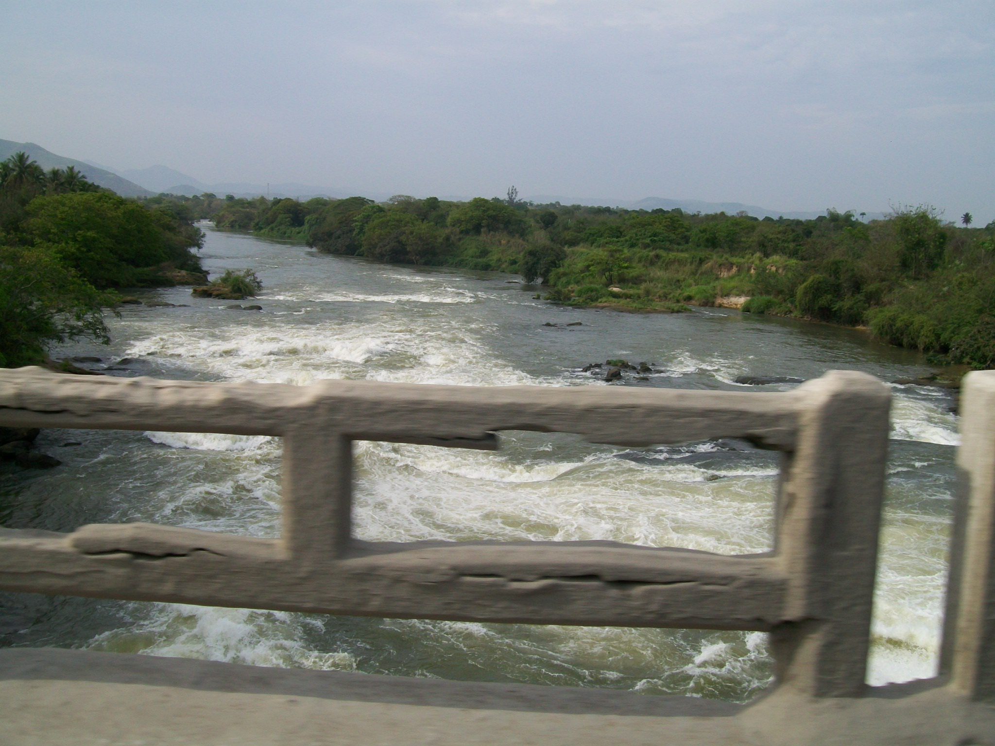 Rio Guandu visto sobre a ponte, na BR-465, na divisa de Seropédica e Nova Iguaçu, RJ.